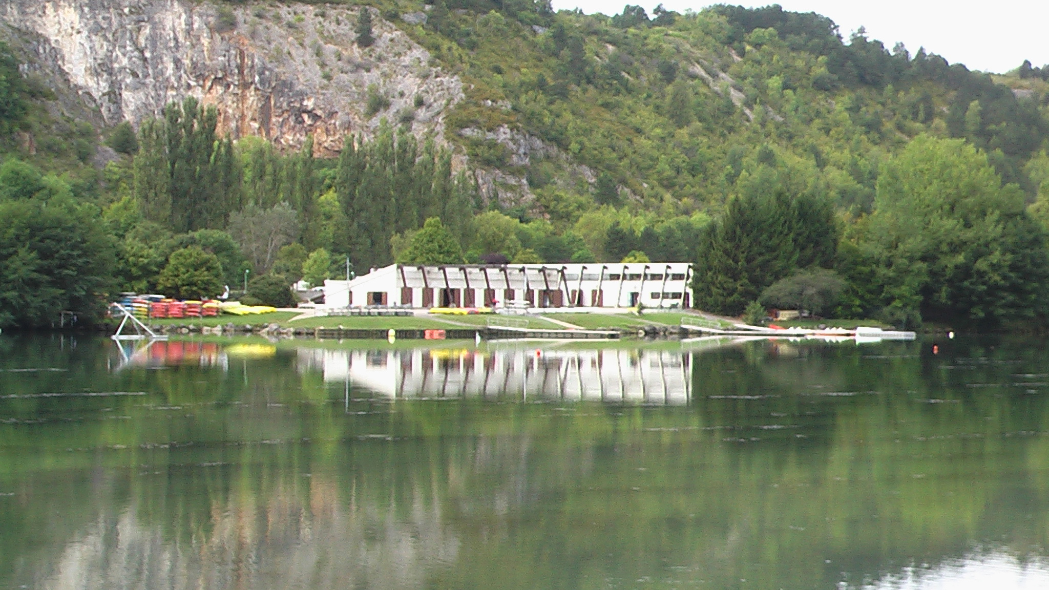 La base nautique municipale du Lac Kir, située sur sa rive droite (sud).